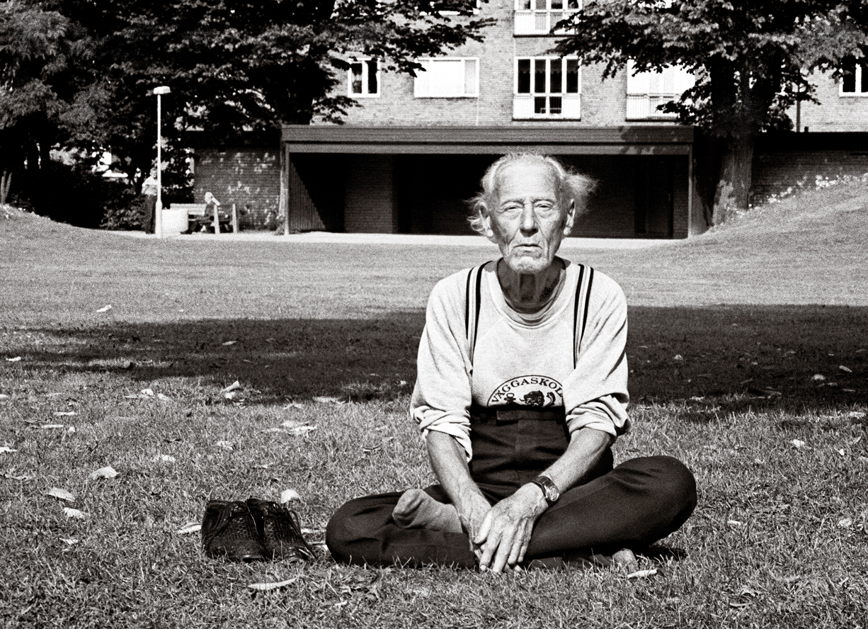 En gammal man mediterar i Badhusparken. Malmö 1983.